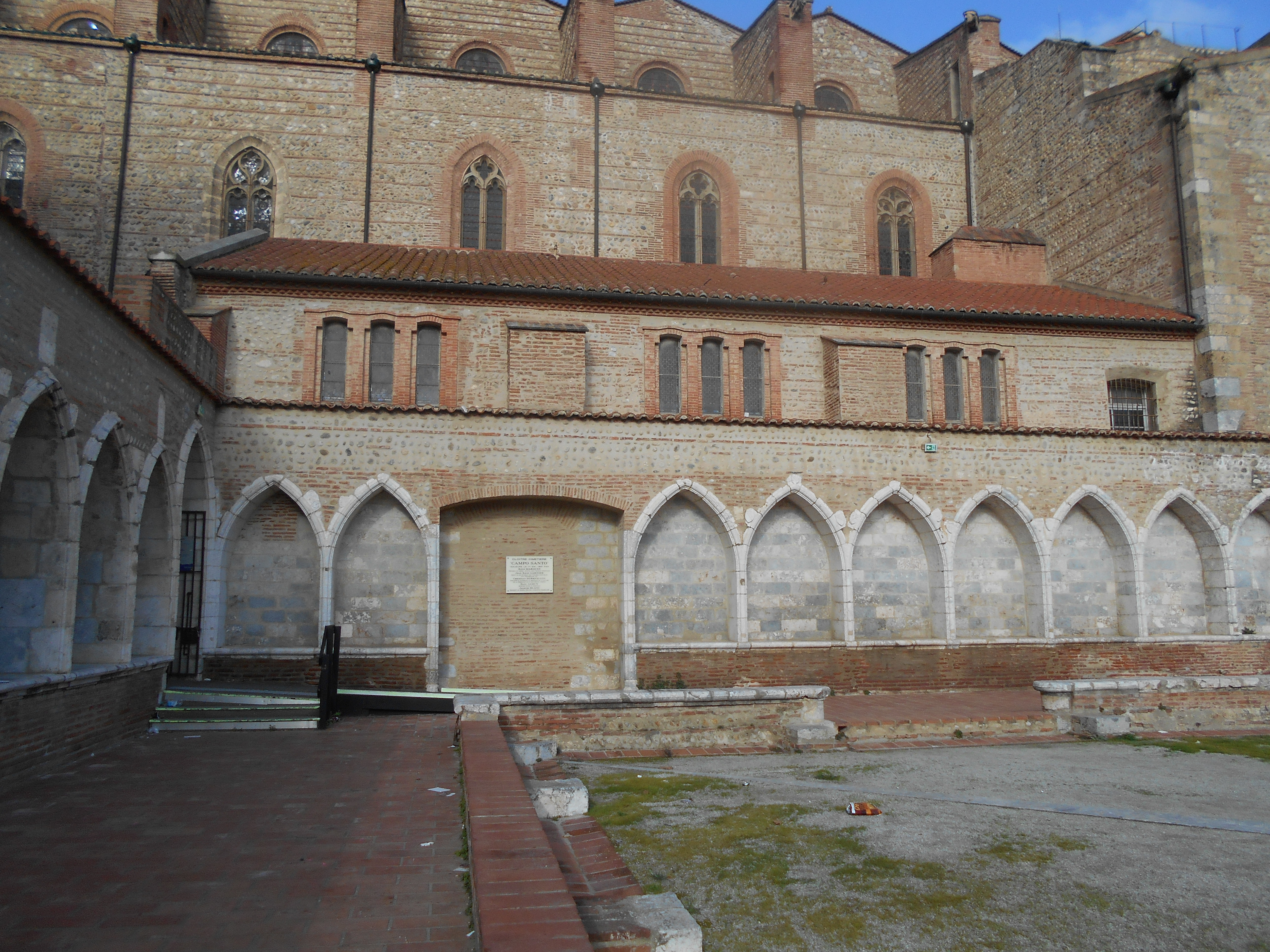 El Devot Crist de Perpinyà. Vista lateral des del sud